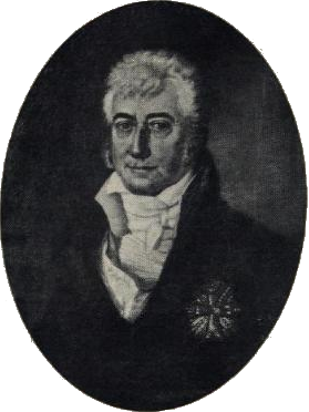 Statsminister Peder Anker.